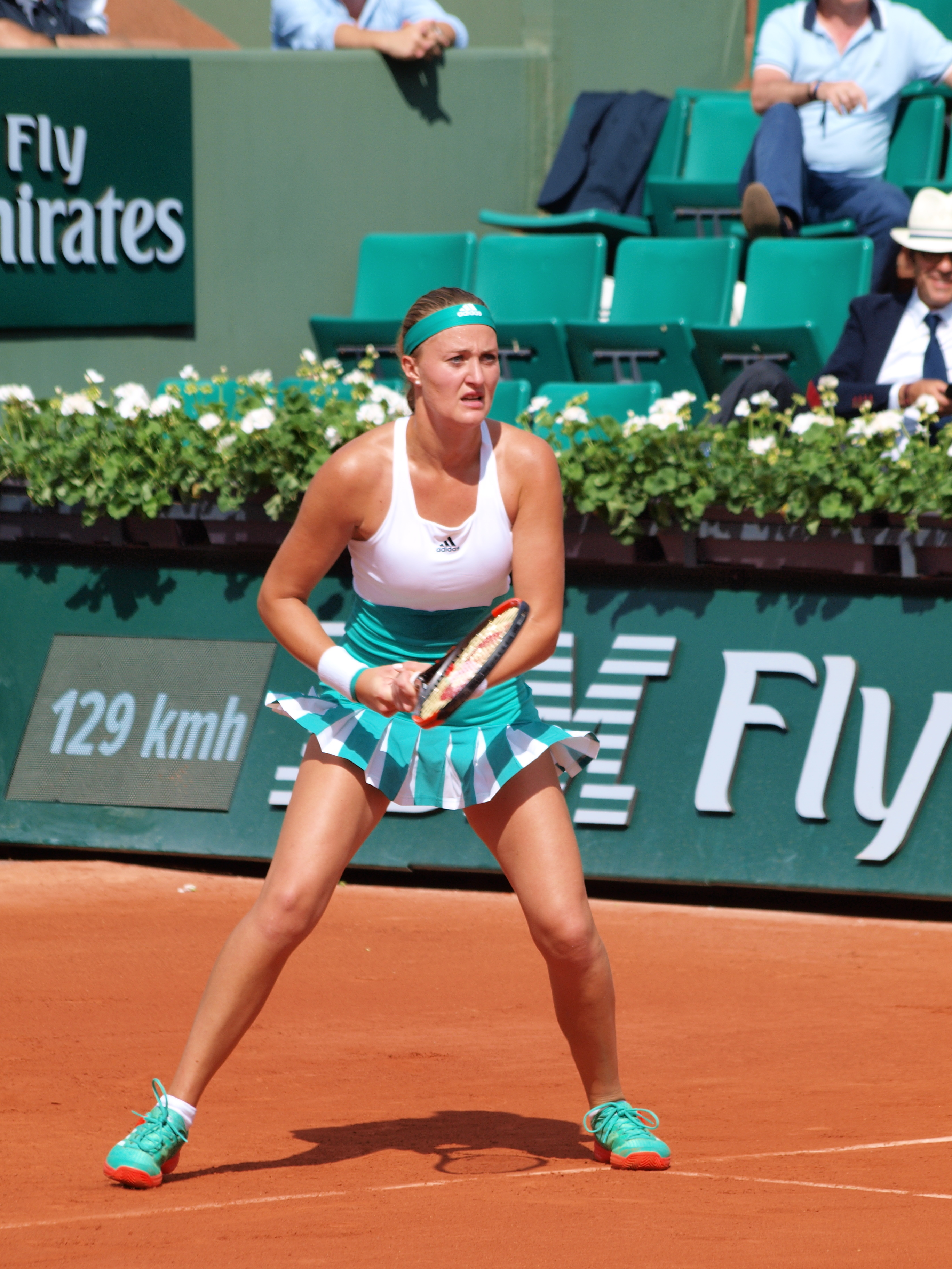 Kristina Mladenovic, aux Internationaux de France de Roland Garros (Paris), le 31 mai 2017, dans son match contre Sara Errani.